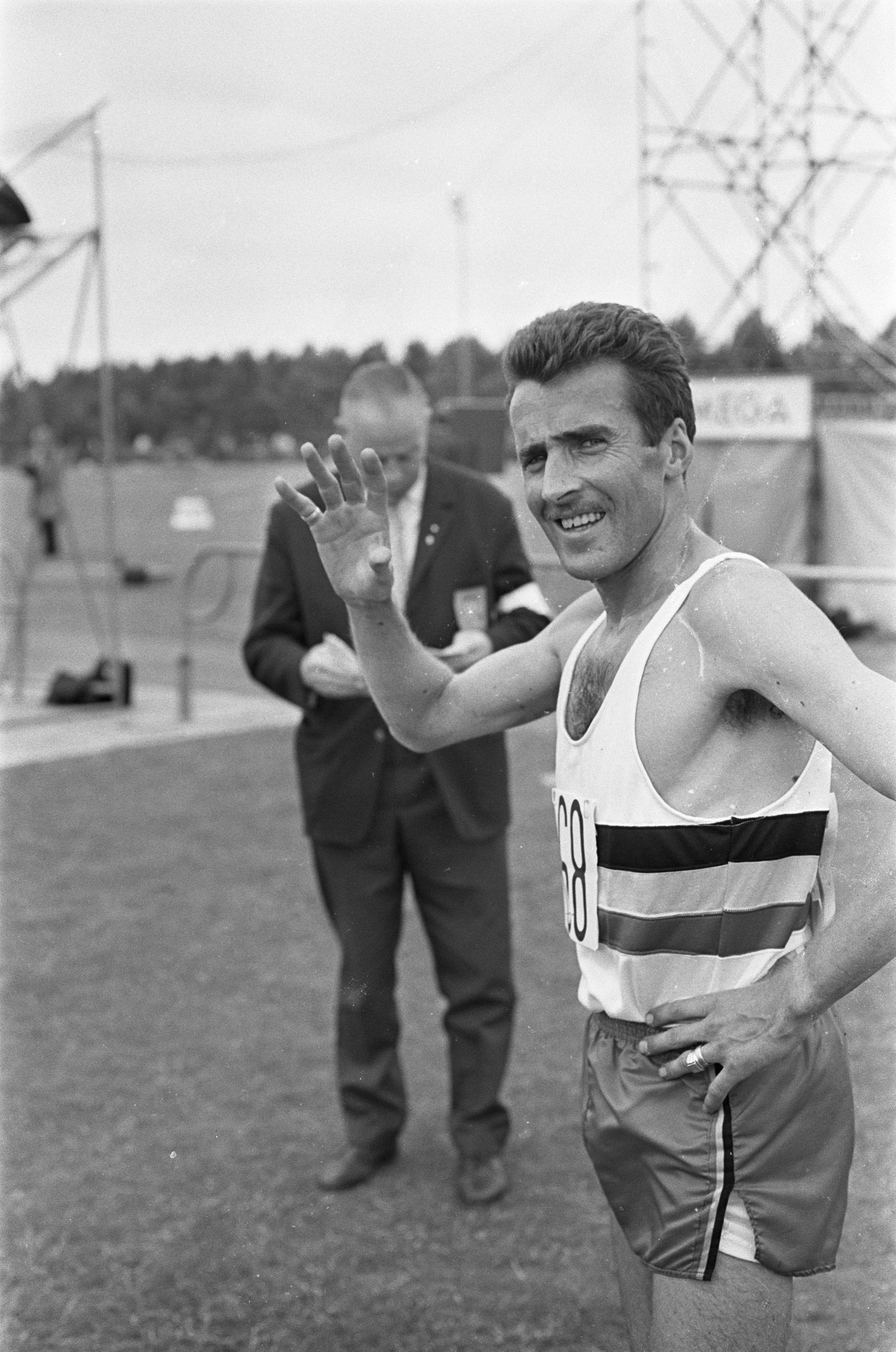 Collectie / Archief : Fotocollectie Anefo Reportage / Serie : Atletiek Nederland-België-Zwitserland Beschrijving : Gaston Roelants Datum : 9 juli 1967 Trefwoorden : atleten, atletiek, sport, sporters Persoonsnaam : Roelants, G. Fotograaf : Jack de Nijs / Anefo Auteursrechthebbende : Nationaal Archief Materiaalsoort : Negatief (zwart/wit) Nummer archiefinventaris : bekijk toegang 2.24.01.05 Bestanddeelnummer : 920-4902